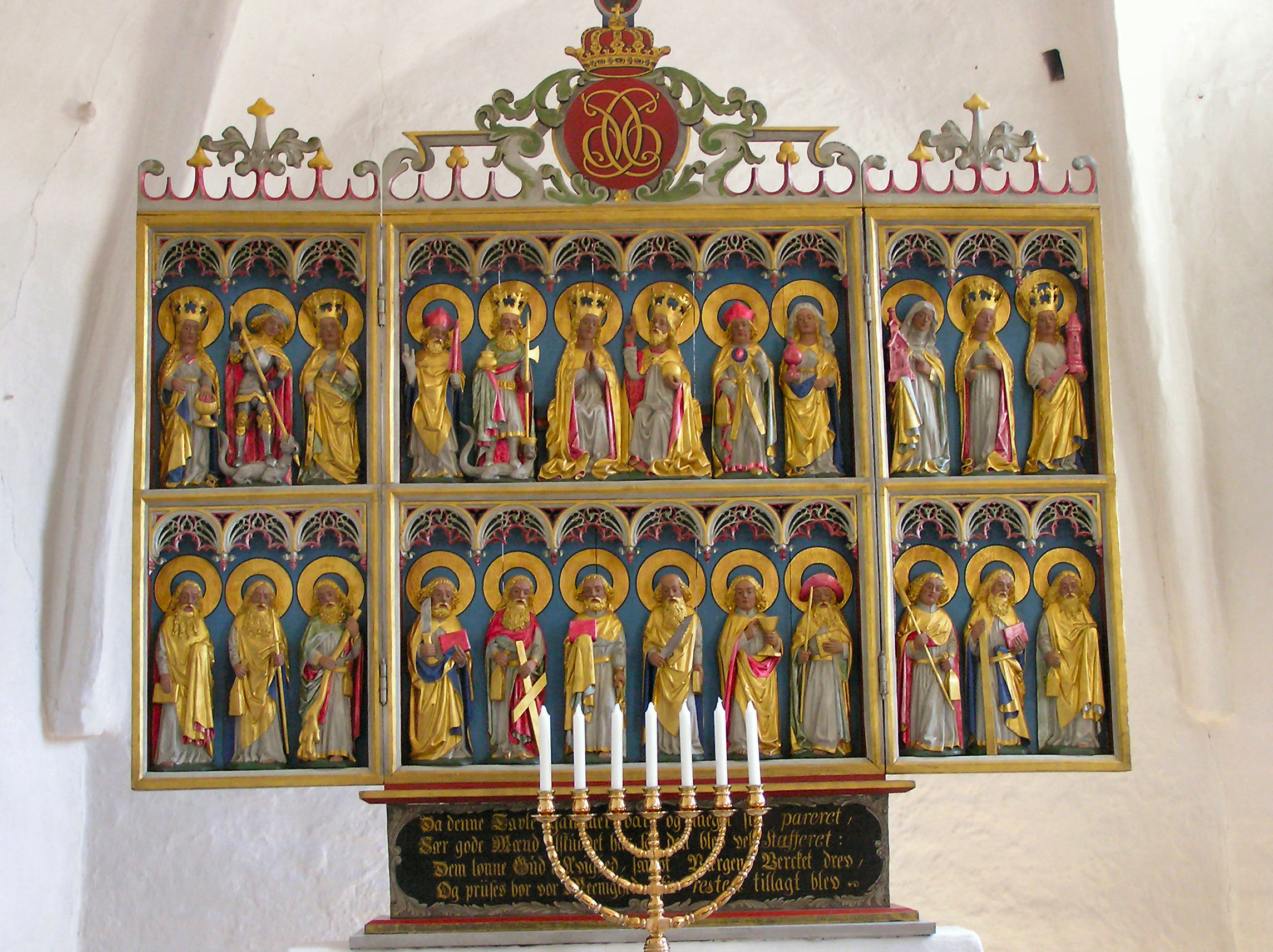 Byrum Kirke, Læsø